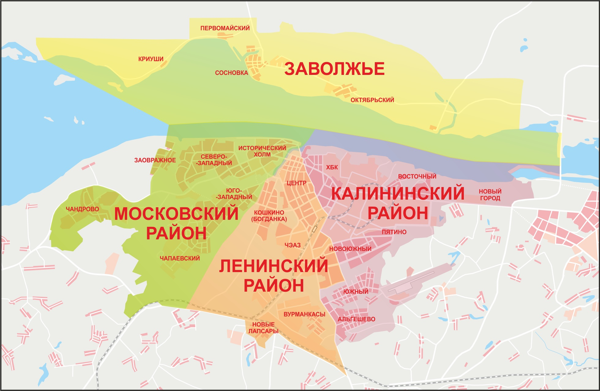 Административные районы Чебоксар